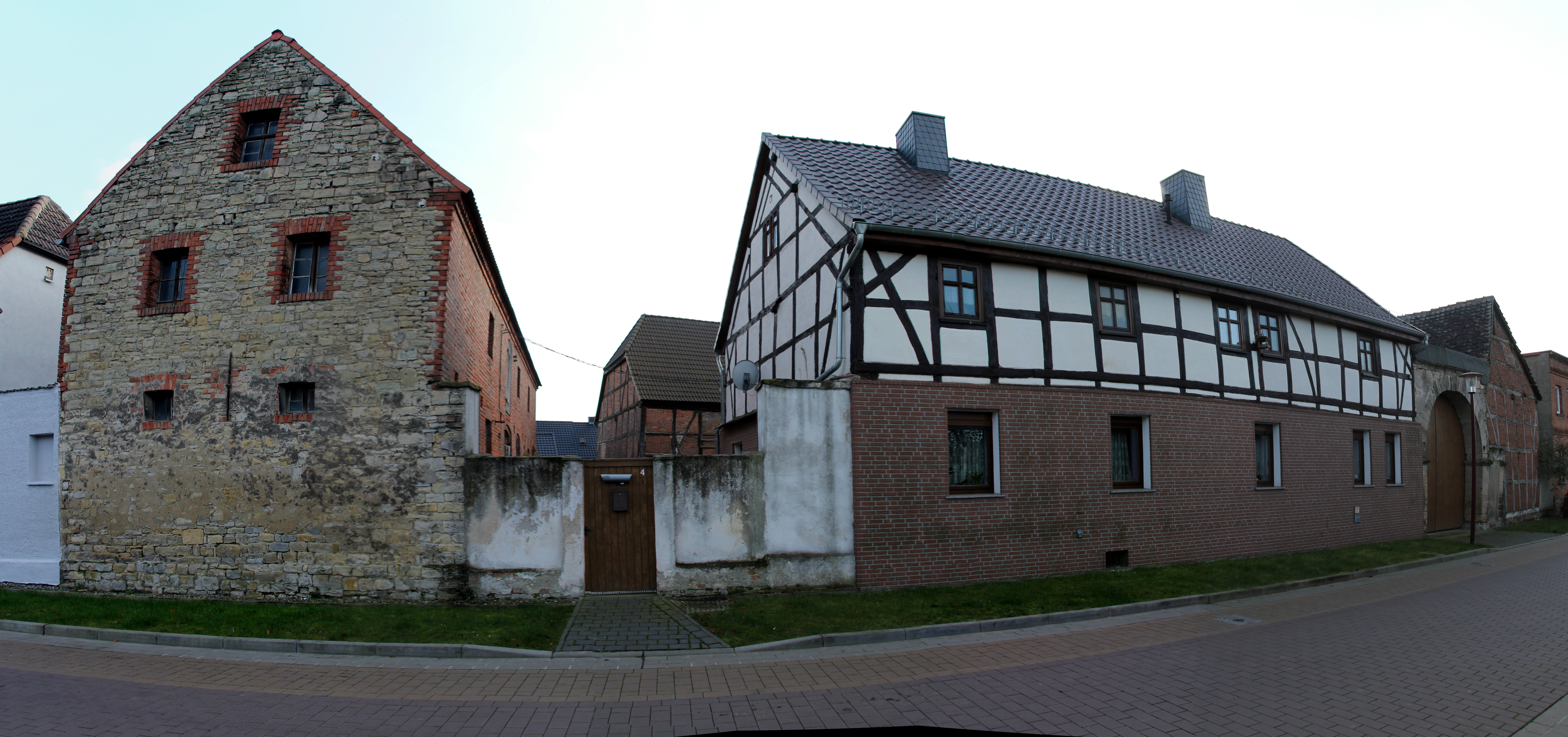 Bauernhof Bauernstraße 4 Groß Rodensleben